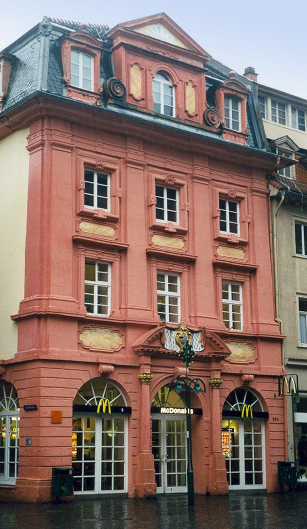 Heidelberg : ehemalige Hofapotheke. Eines der schönsten barocken Stadthäuser in Baden. Beeindruckend die kolossalen Pilaster.